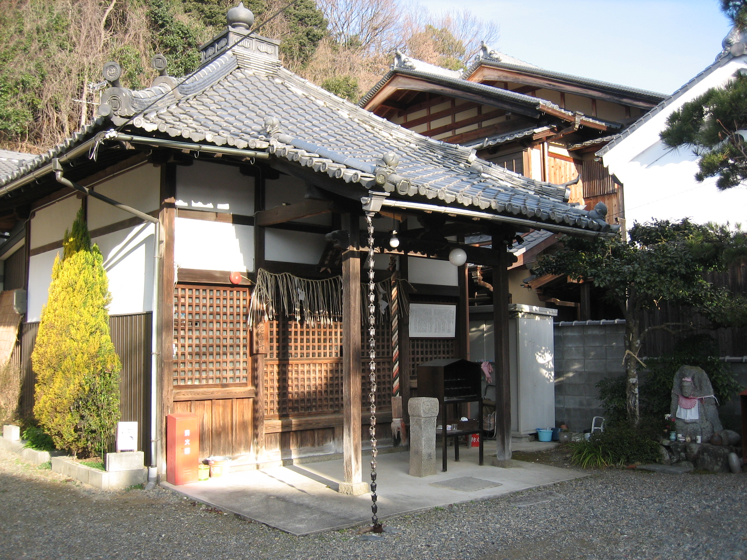 深泥池地蔵堂を北区上賀茂深泥池町から撮影